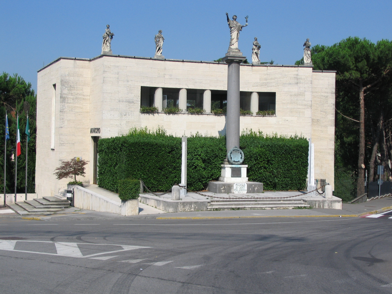 Autore Giorces. Missaglia, il Municipio.